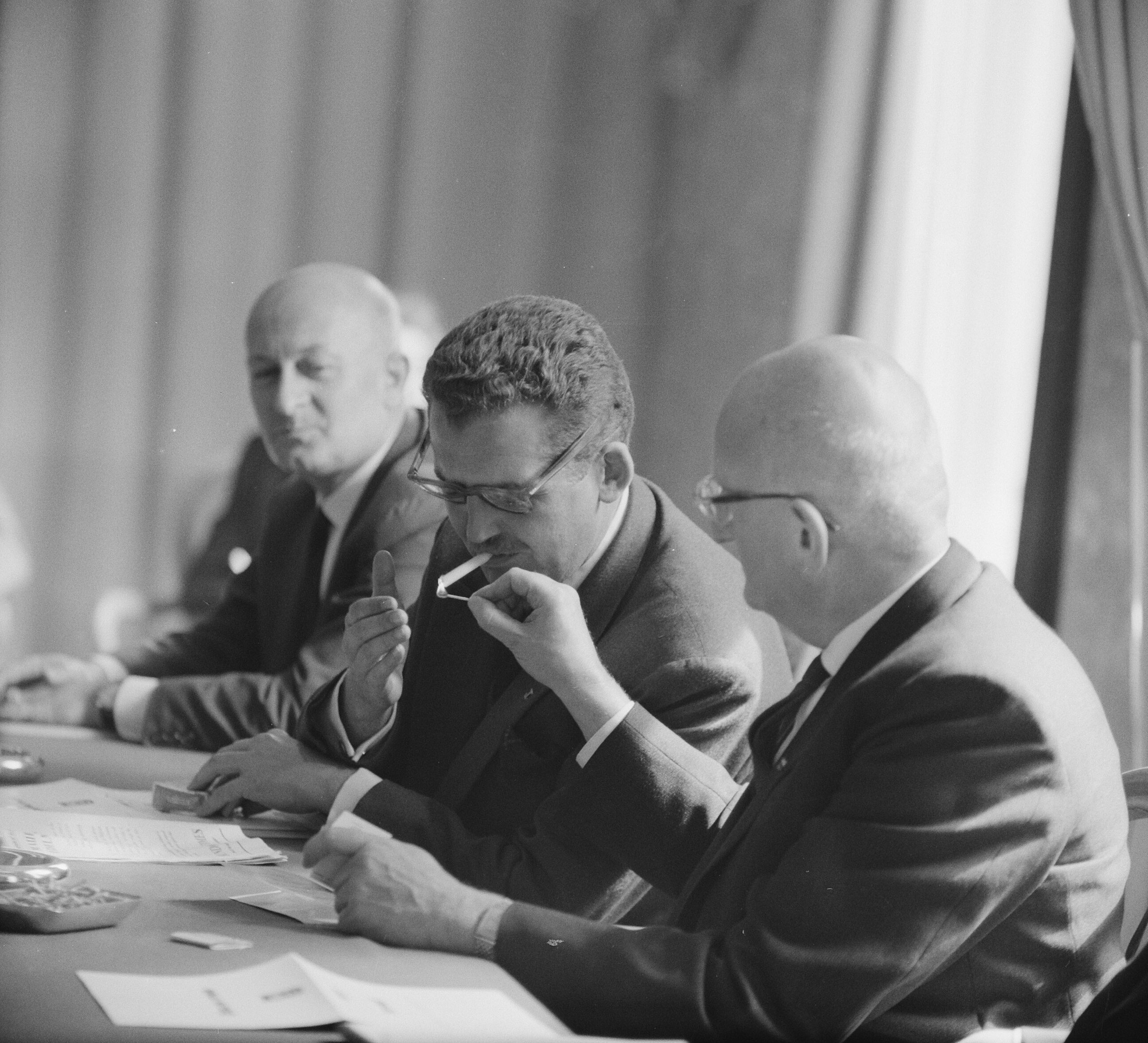 Collectie / Archief : Fotocollectie Anefo Reportage / Serie : [ onbekend ] Beschrijving : Aankomst Baron Rothschild Datum : 13 juni 1961 Trefwoorden : aankomsten Persoonsnaam : Baron Rothschild Fotograaf : Nijs, Jac. de / Anefo Auteursrechthebbende : Nationaal Archief Materiaalsoort : Negatief (zwart/wit) Nummer archiefinventaris : bekijk toegang 2.24.01.03 Bestanddeelnummer : 912-5906 Reacties Geplaatst door Maaike op 01 oktober 2013 - 14:55. In het midden baron Edmond de Rothschild Persoonsnamen: baron Edmond de Rothschild Plaats: Schiphol; Noord-Holland Geplaatst door Maaike op 01 oktober 2013 - 15:15. Persconferentie in het Amstel Hotel Plaats: Amsterdam; Noord-Holland